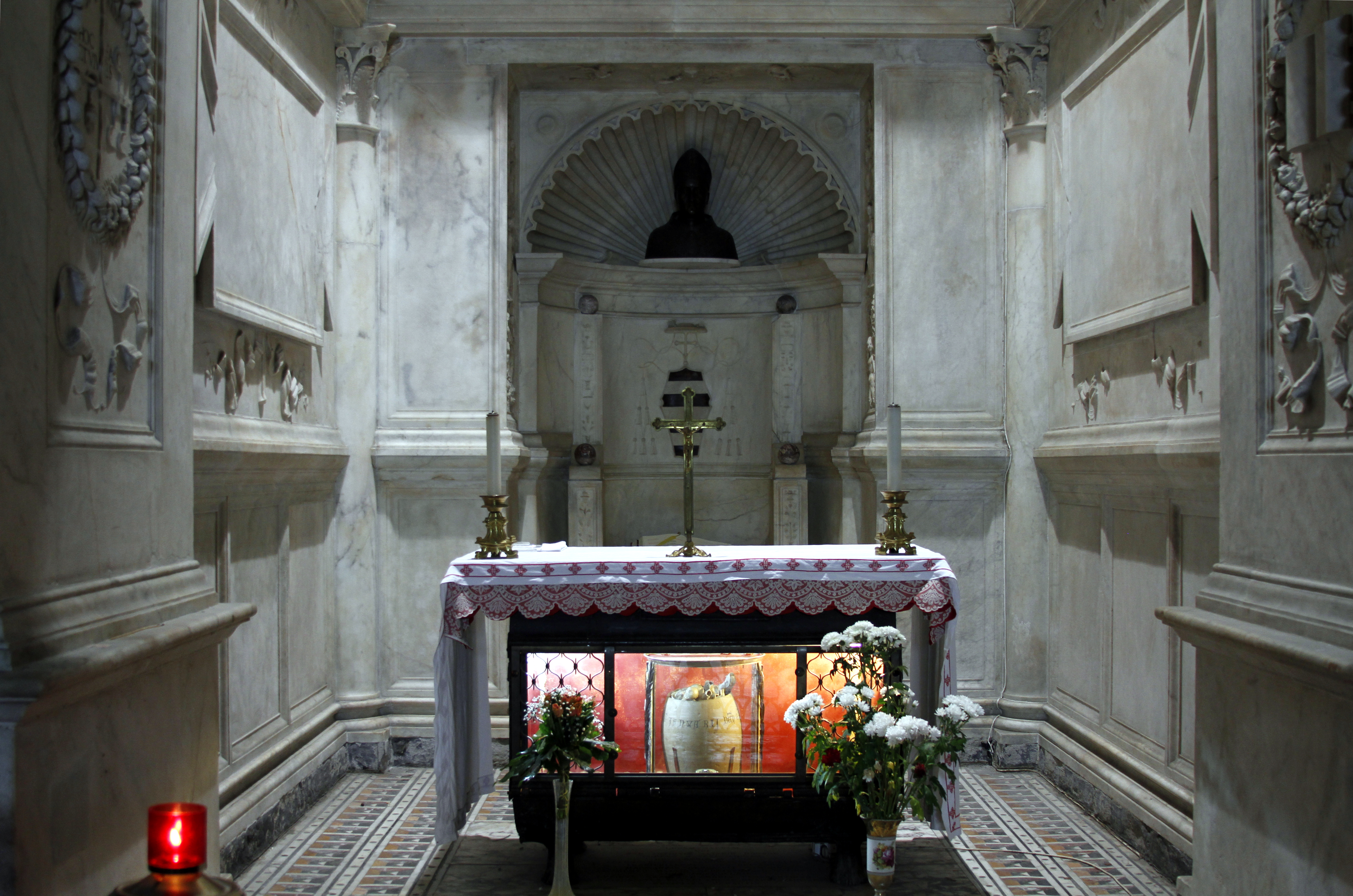 Cappella del Succorpo, Catedral de Nápoles